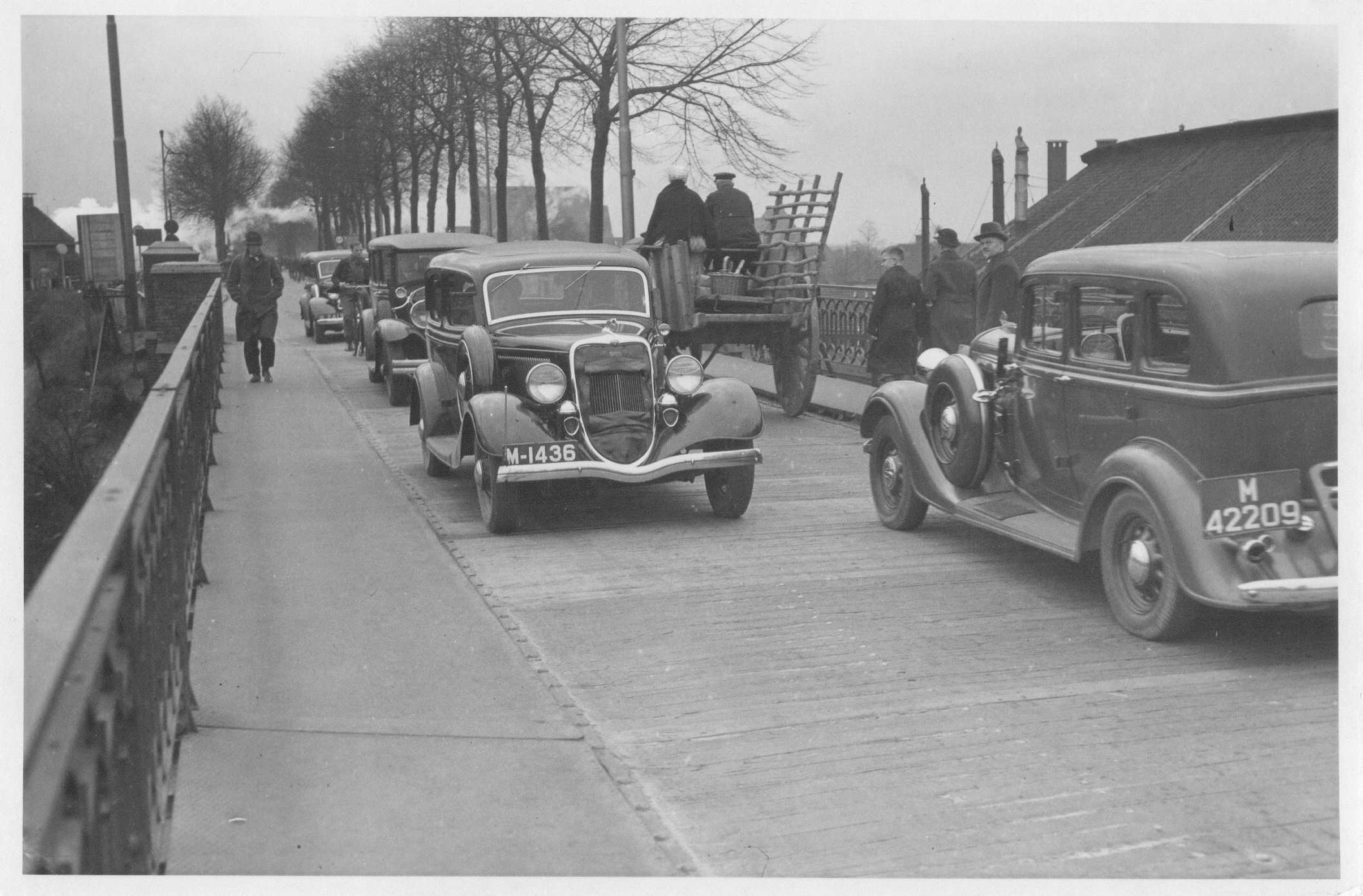 De Graafsebrug vóór de vernieuwing